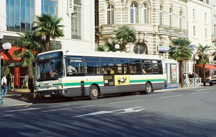 Ancien look 1980 - 2000 des bus de la STAP Pau